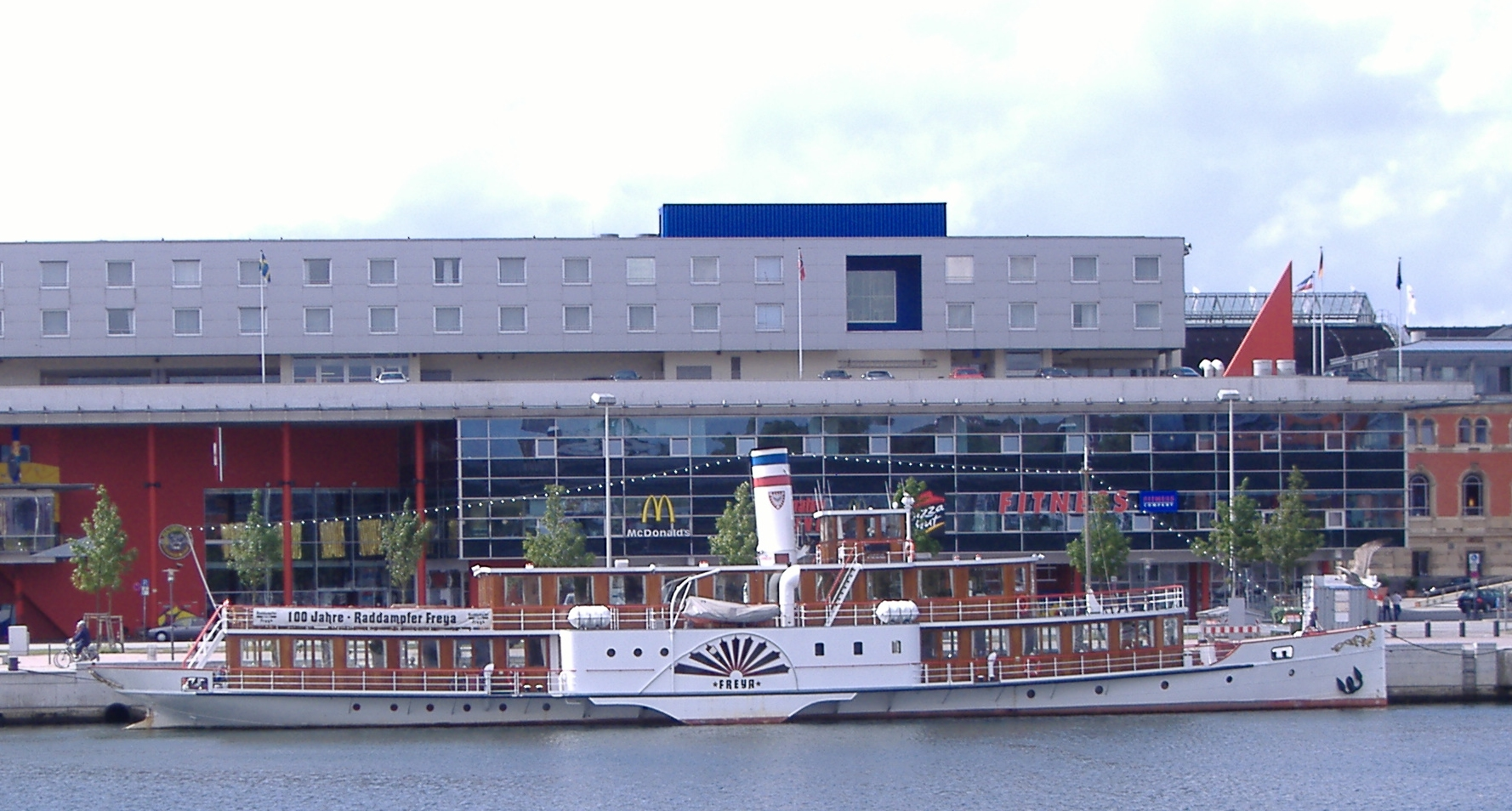 Raddampfer Freya - Seitenansicht